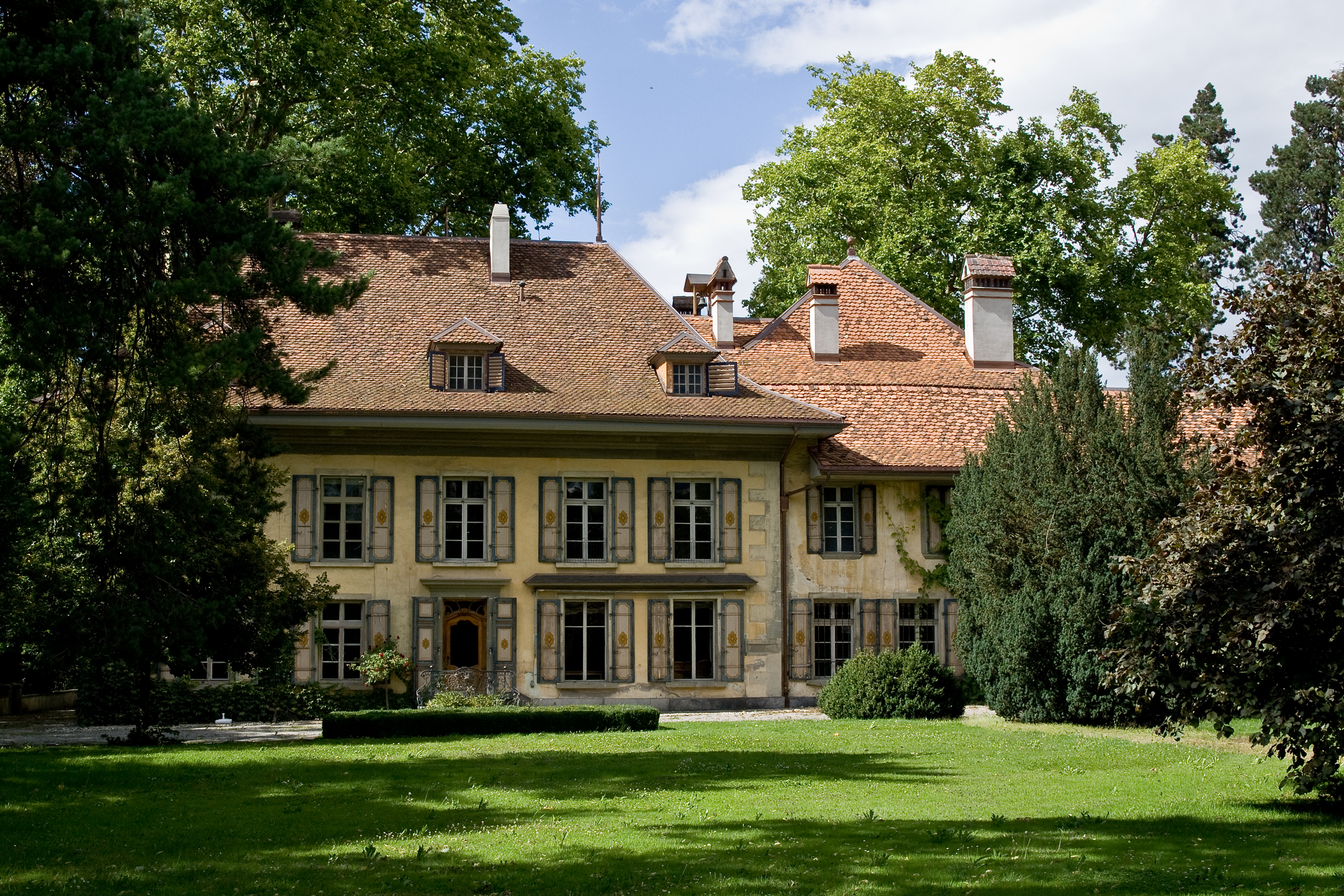 Schloss Kiesen, Rückseite (in unrenoviertem Zustand)